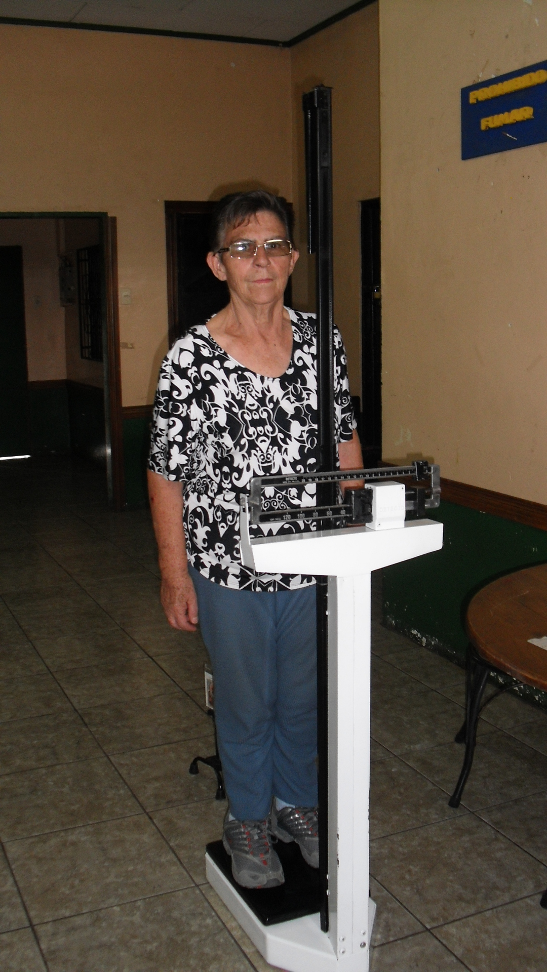 control de peso